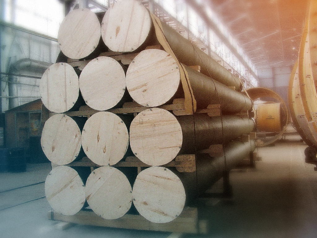 Пульпопроводы стеклопластиковые для перекачивания пульпы на предприятиях горно-обогатительного комплекса